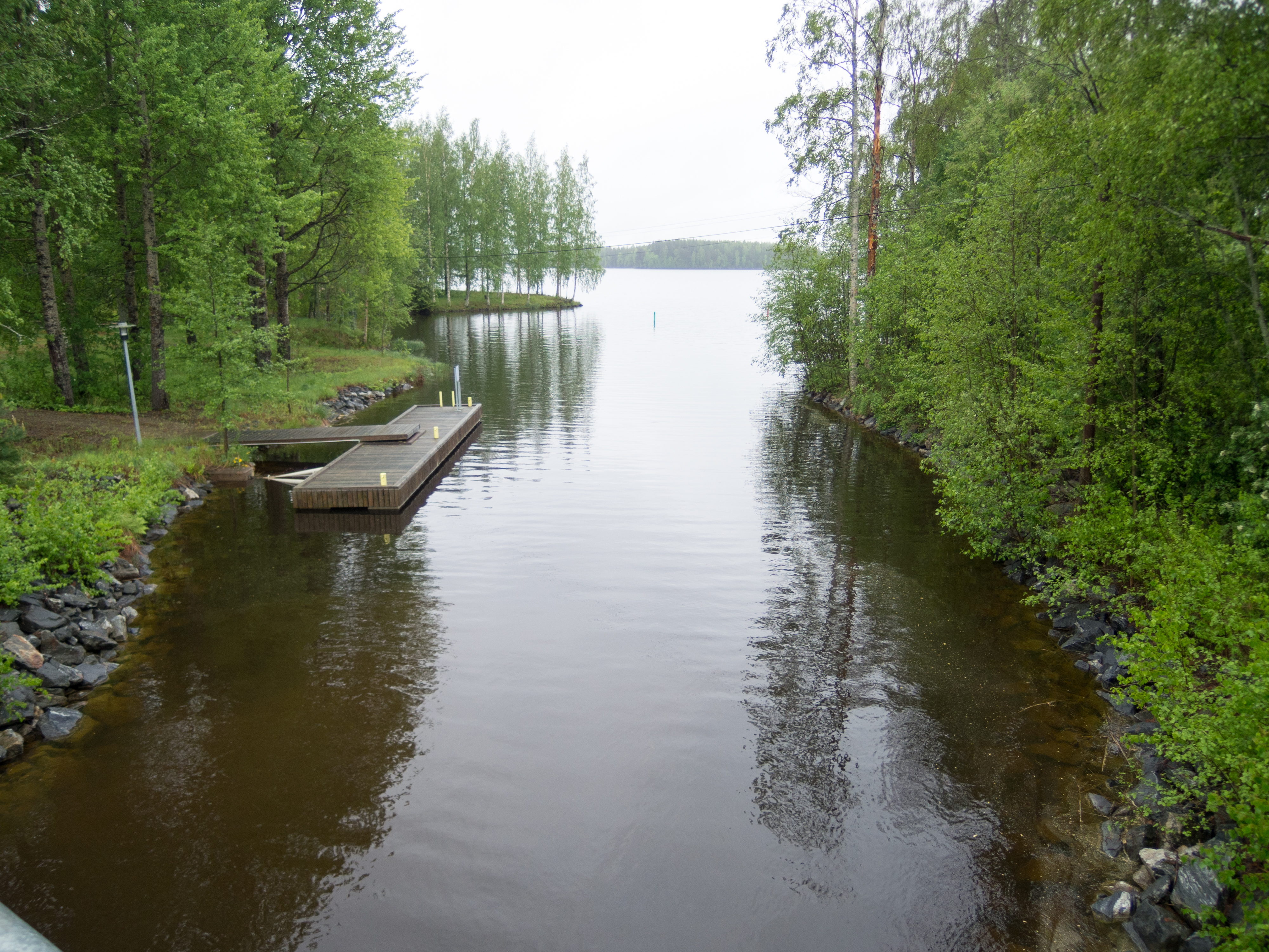 Naapuskosken kanava